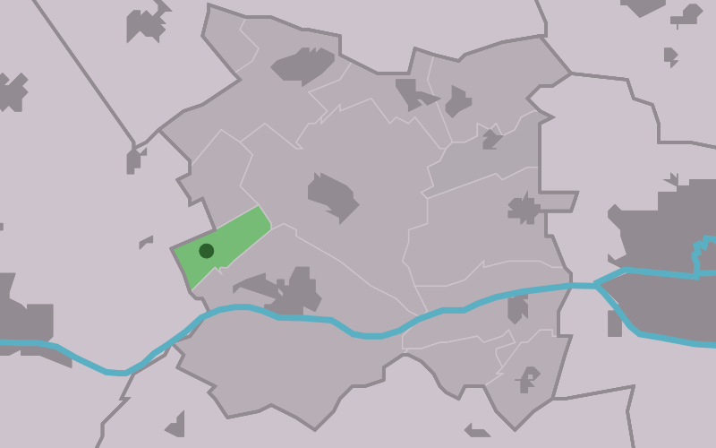 Kaartsje fan himrik fan Skingen